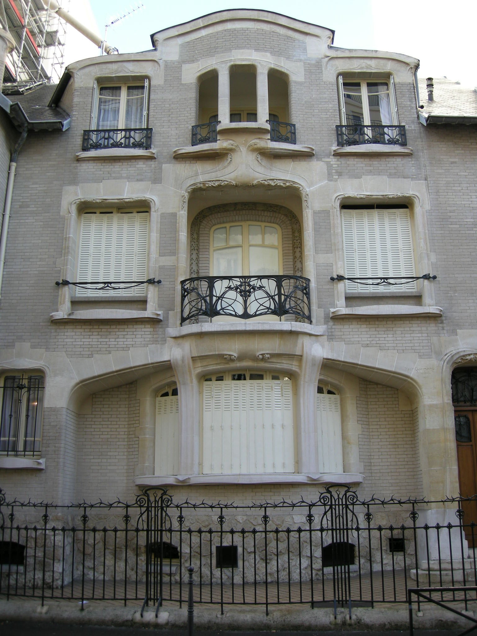 Hotel mezzara 1911